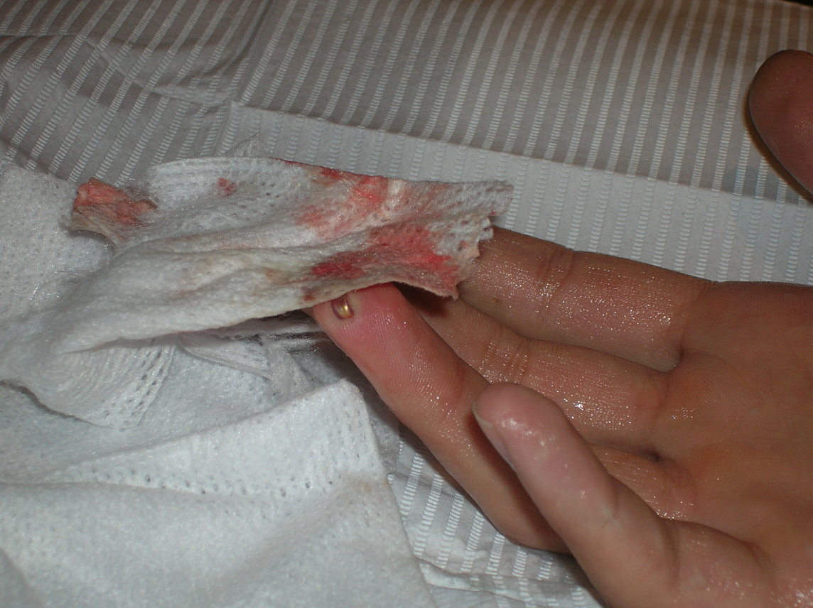 magnet20